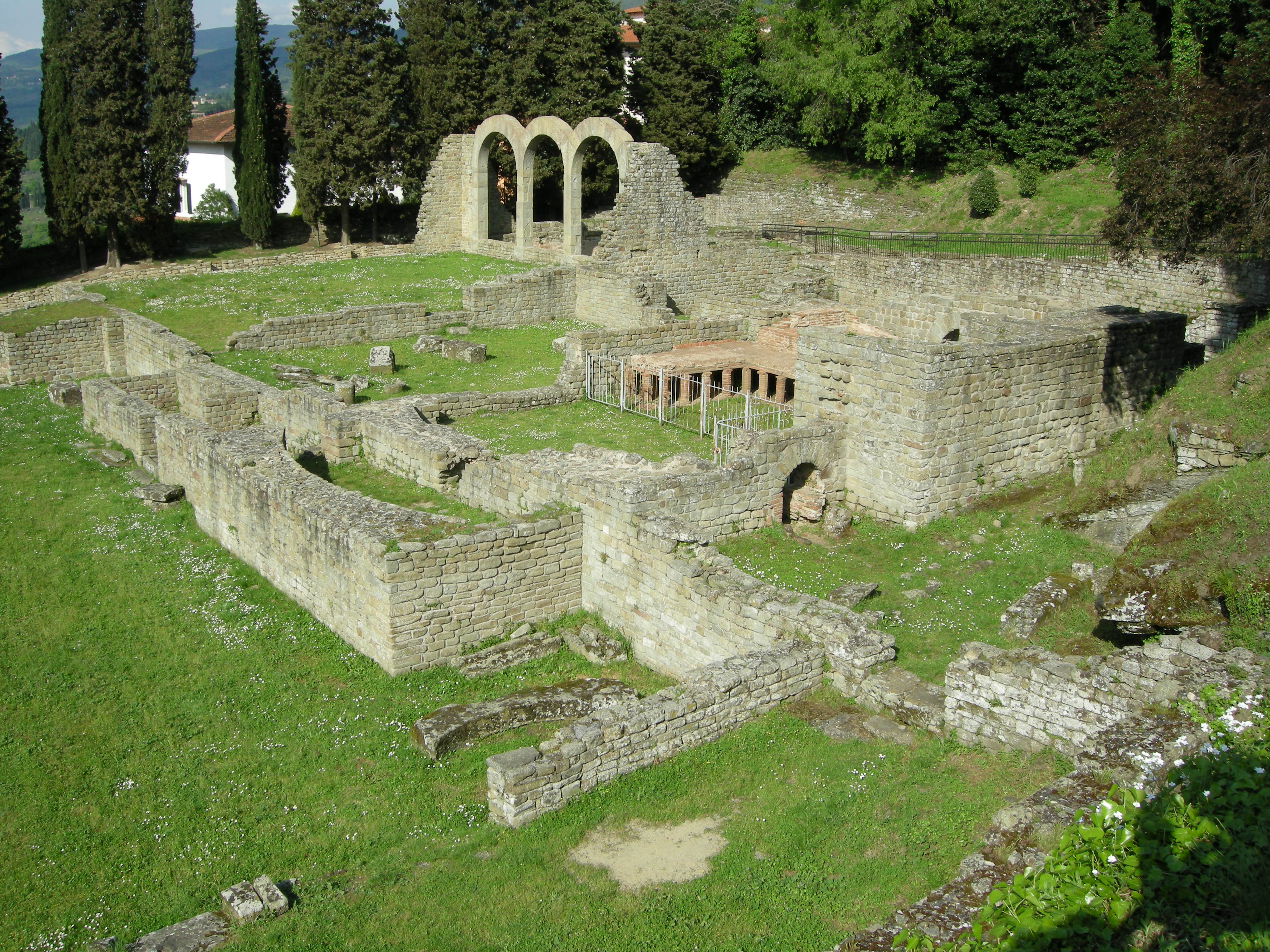 Fiesole, area archeologica, terme